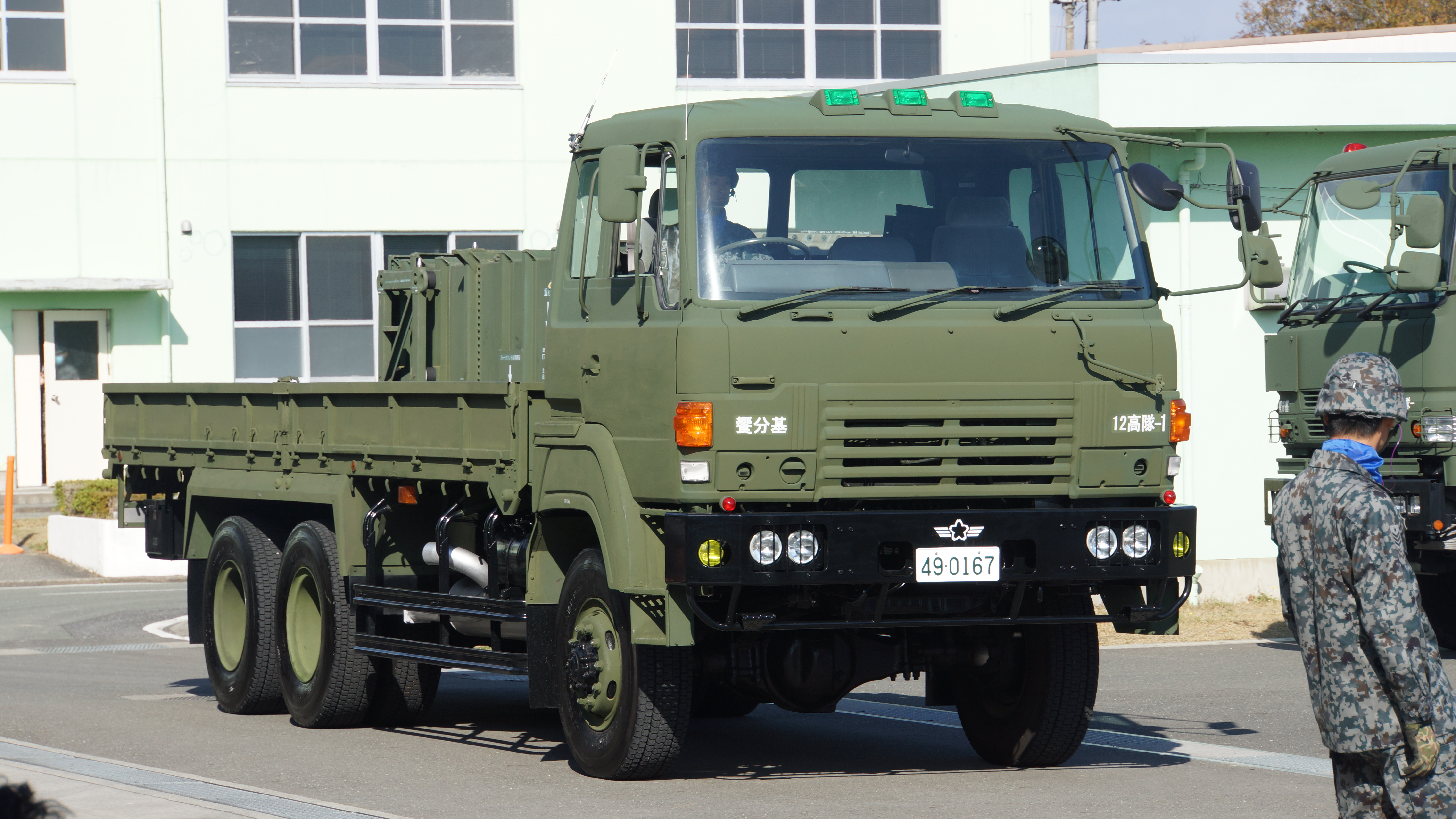 航空自衛隊 ミサイル運搬車（日野・スーパードルフィン、49-0167号車） 右前面。2015年11月28日 饗庭野分屯基地にて。